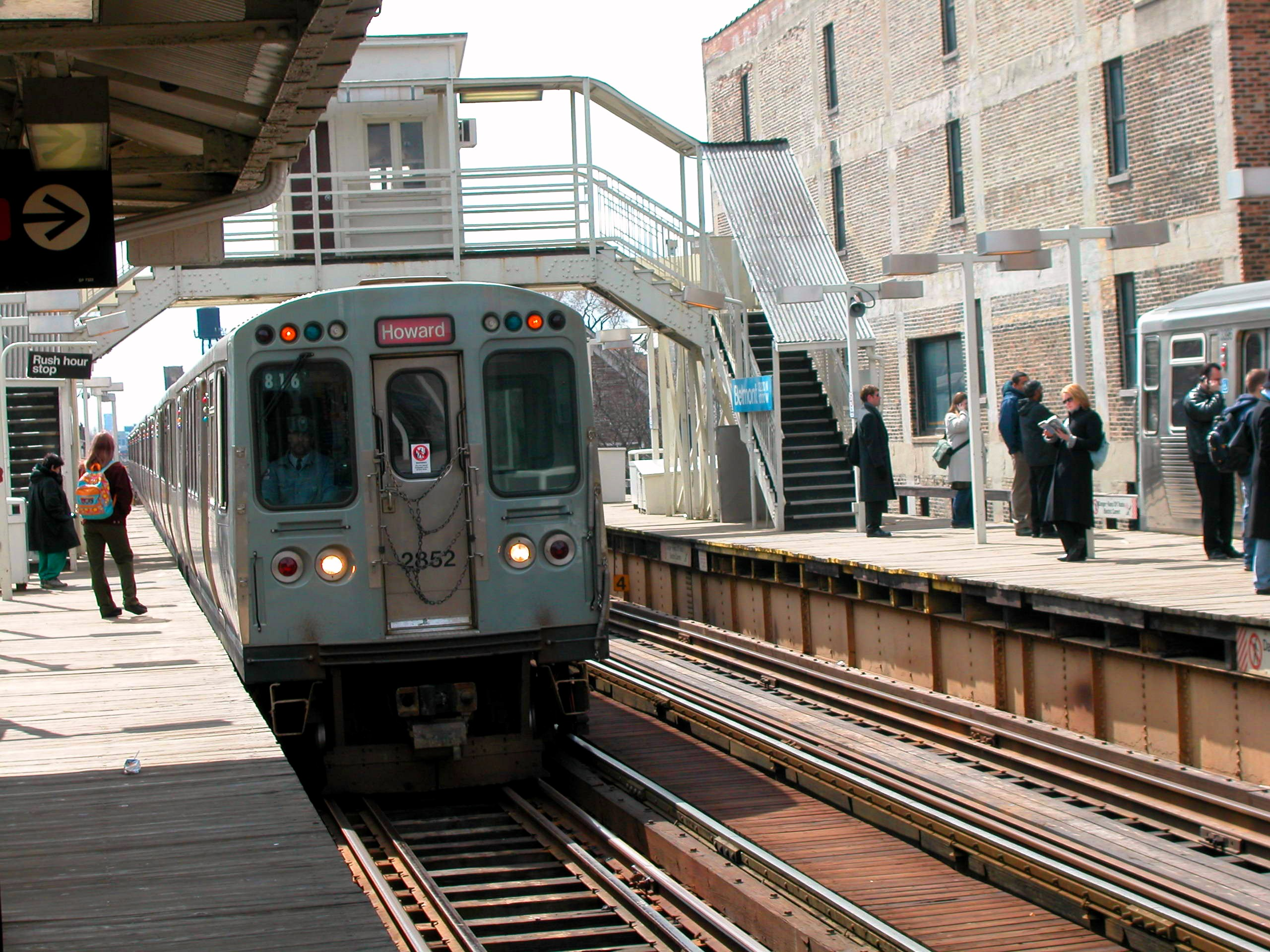 20030329 23 CTA Belmont Ave. L Station